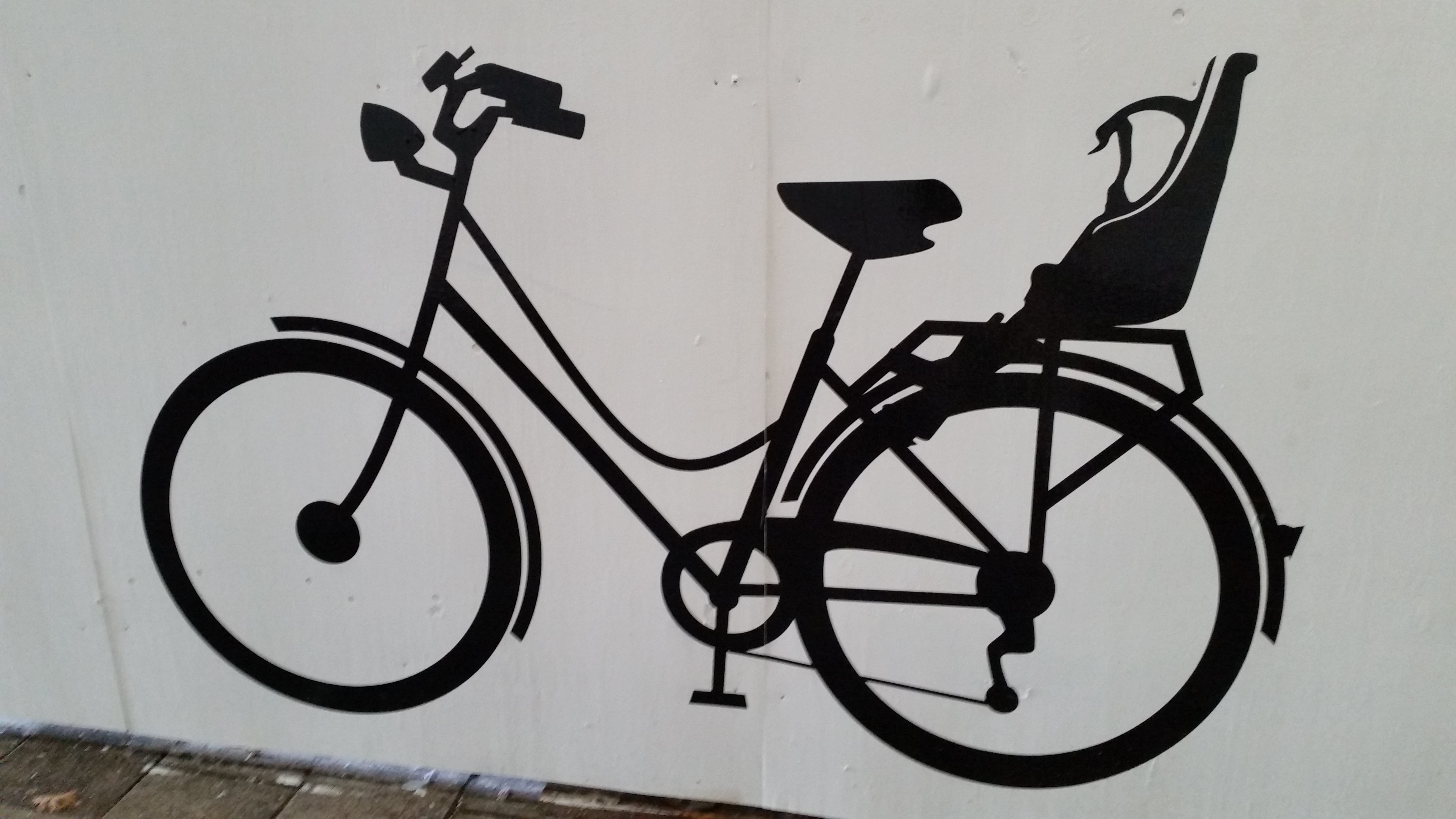 Een titelloos kunstwerk in de tijdelijke verlenging van brug 857 in de Parnassusweg